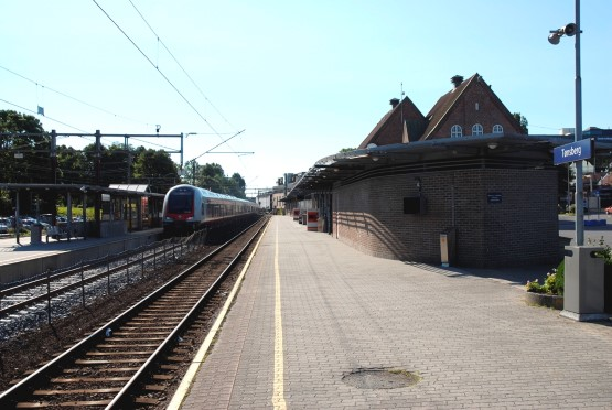 Tønsberg stasjon.